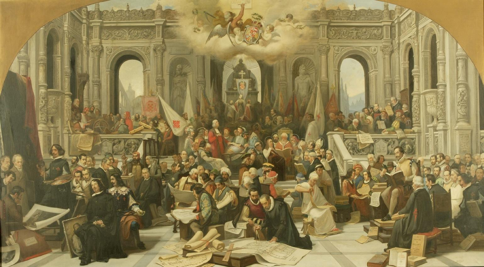 El lienzo es una alegoría de la Cultura Española en la que aparecen representados numerosos artistas y literatos.